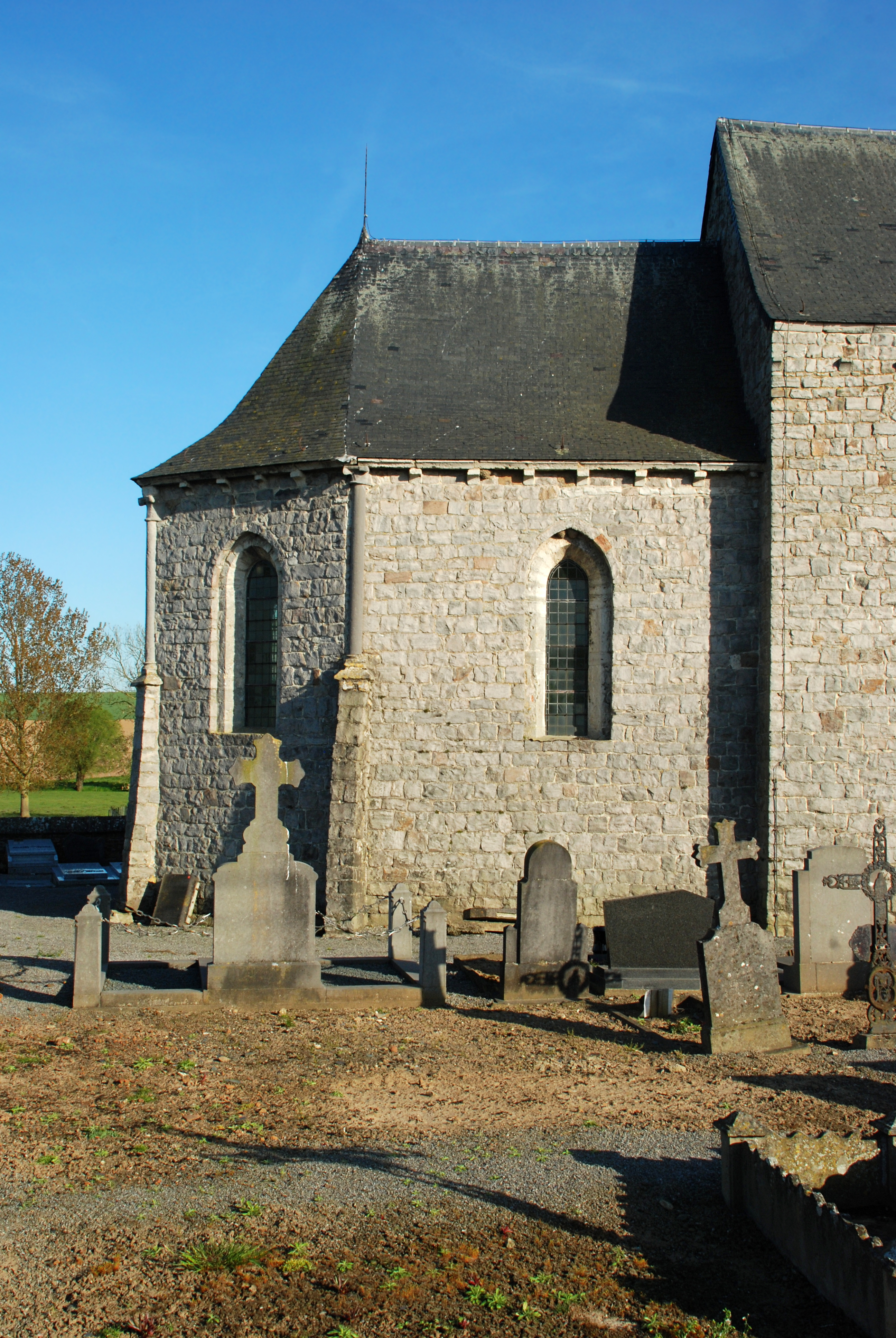 Belgique - Brabant wallon - Jodoigne - Piétrain - Chapelle Sainte-Catherine d'Herbais